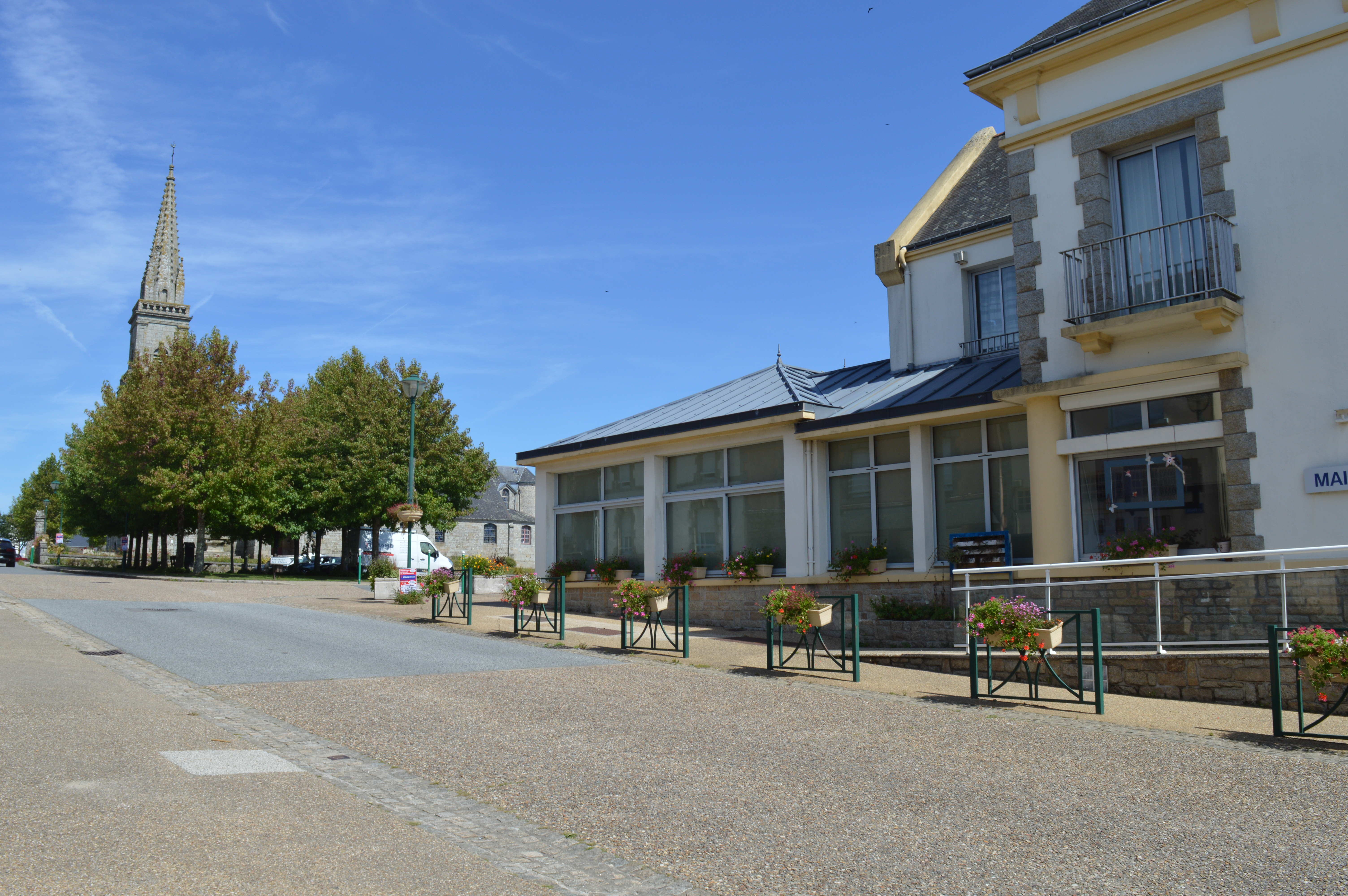 Photo du bourg d'Inguiniel incluant l’église St Alban et une partie de la mairie